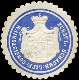 Sealing stamp Title: Fürstlich Schaumburg Lippische Consistorium Description: blau, weiß, geprägt Place: size: 4 cm